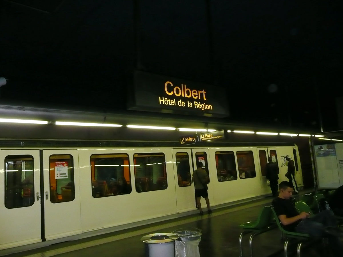 Station "Colbert - Hôtel de Région" de la ligne 1 du métro de Marseille.